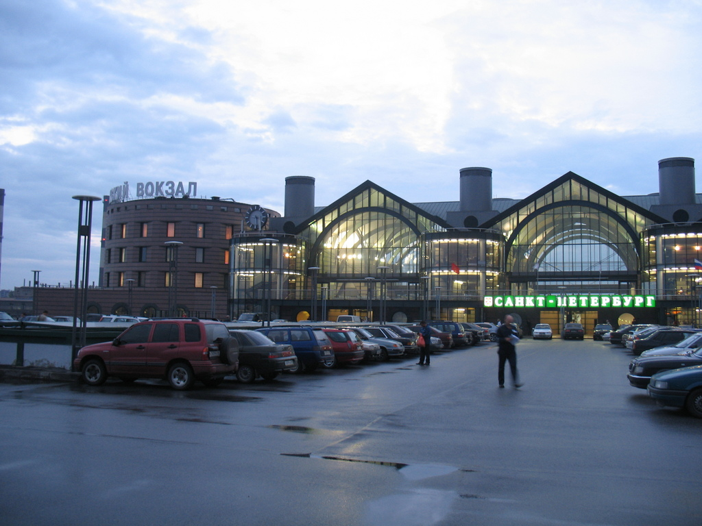 Ladozhsky Rail Terminal